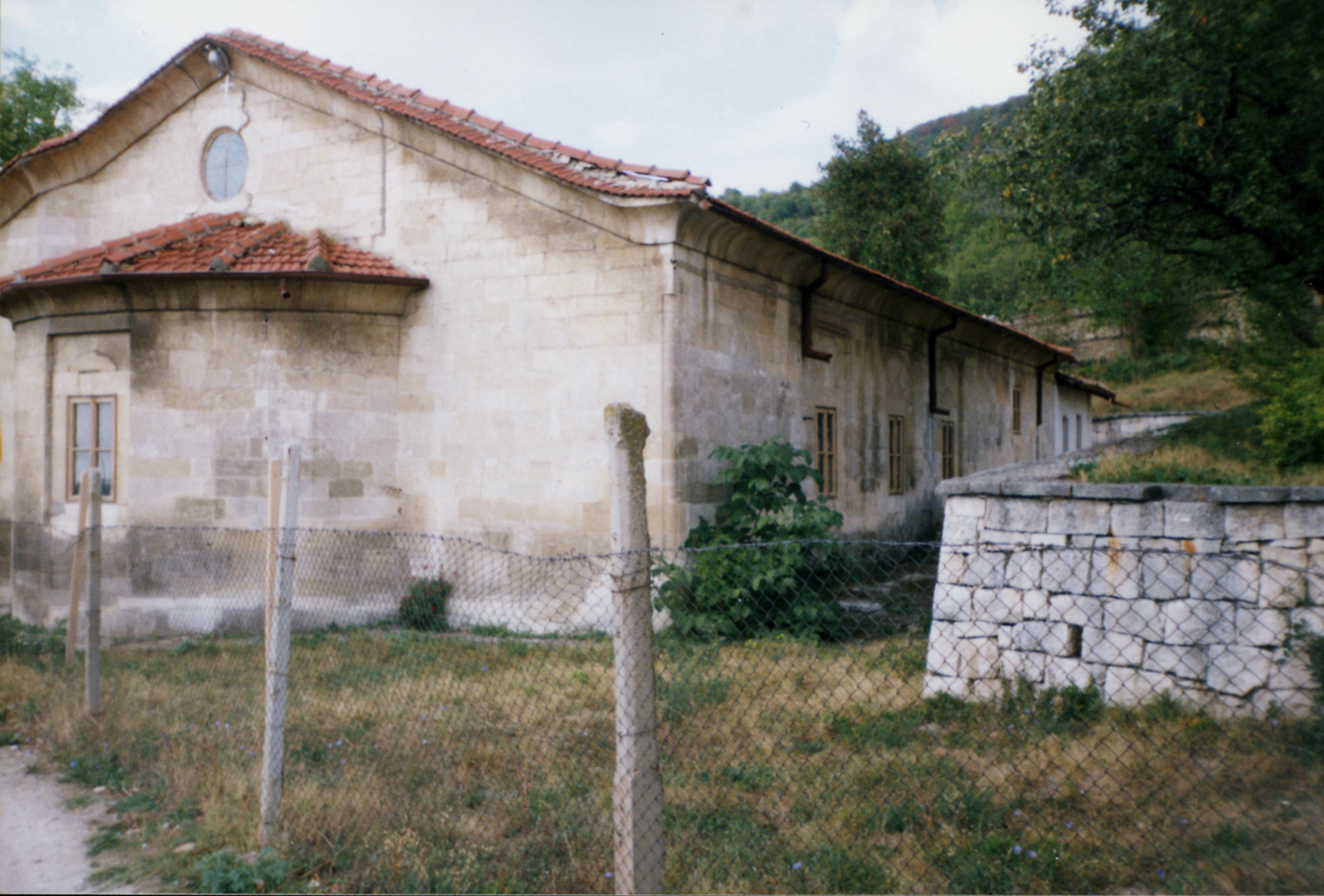 черквата "Св. Илия" в кв. Дивдядово, Шумен, построена през 1846 г.